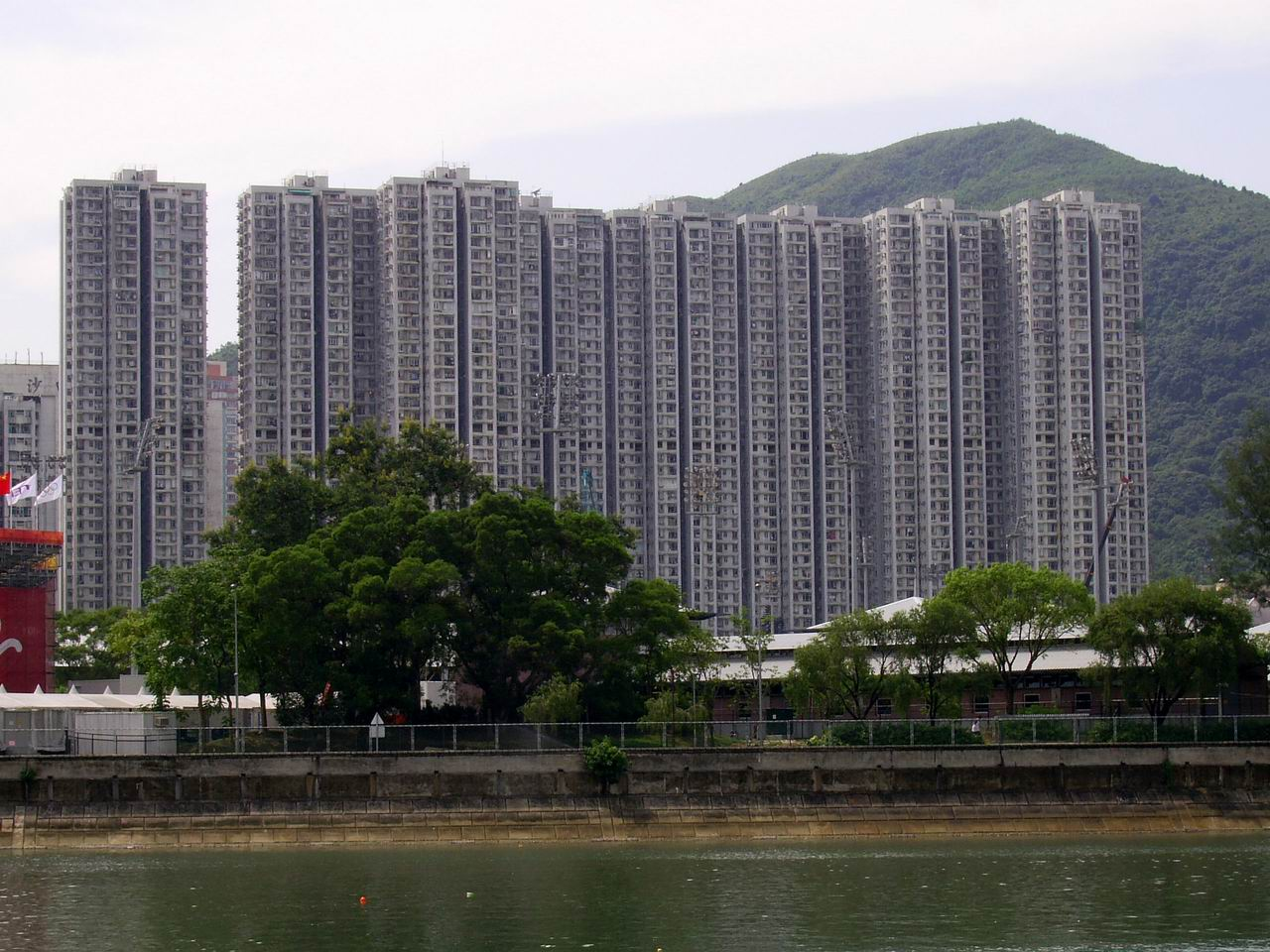 中文（香港）: 銀禧花園高座